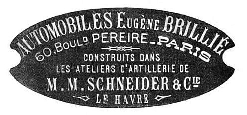 Publicité Eugène Brillié de 1907 - Histoire de l'automobile, Pierre Souvestre, éd. H. Dunod et E. Pinat, 1907, p.786 (ASIN B001BPBE58)